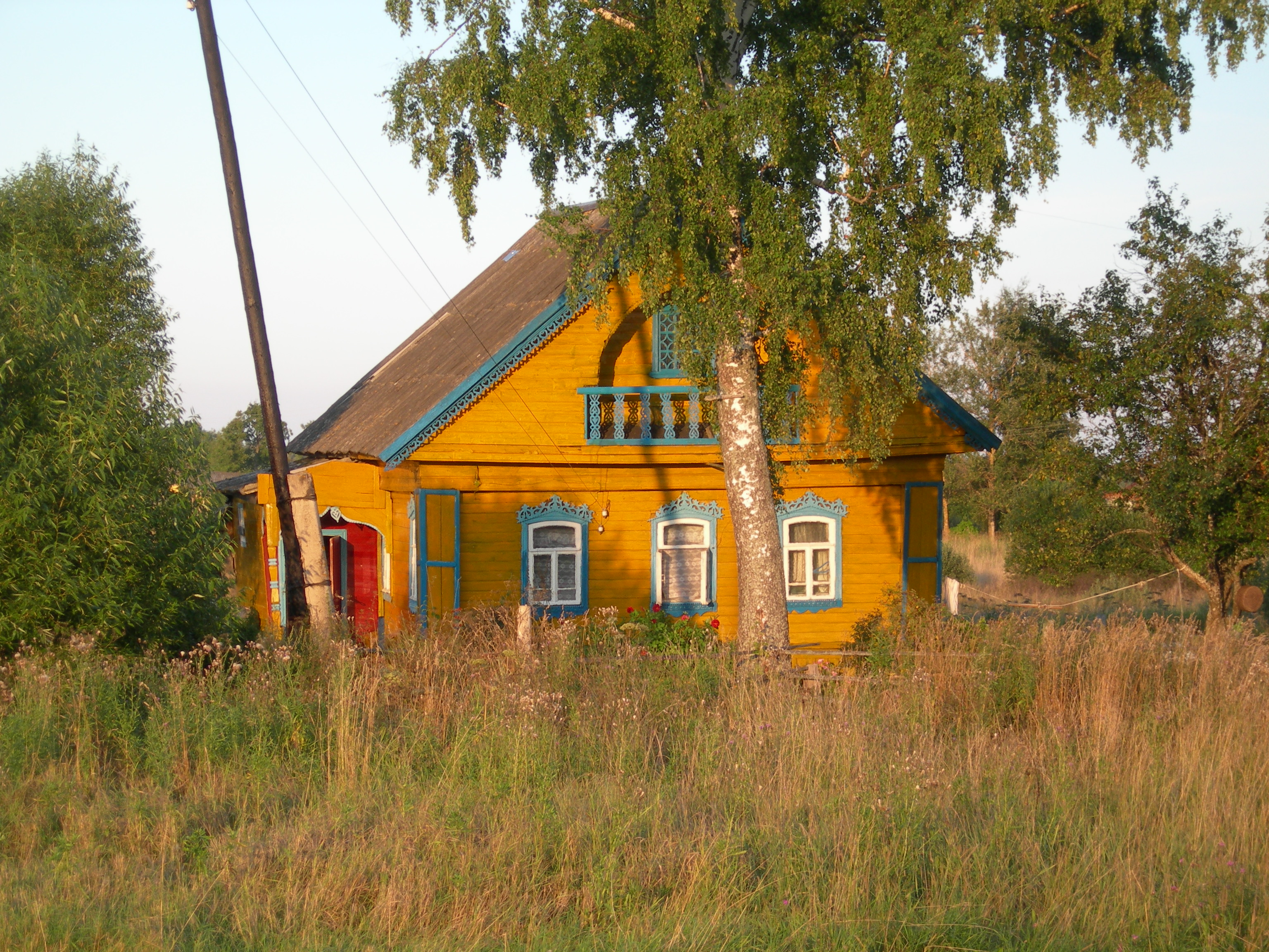 Деревня Рыкулино Кашинского района Тверской области